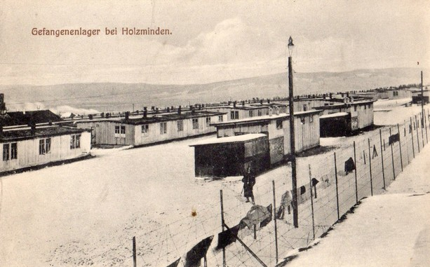 Carte postale allemande illustrant une partie du camp d'internement d'Holzminden, collection personnelle, photographe inconnu